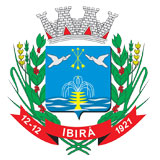 Brasão da cidade de Ibirá, SP, estabelecido pela Lei Municipal Nº: 532 de 27 de fevereiro de 1976 (